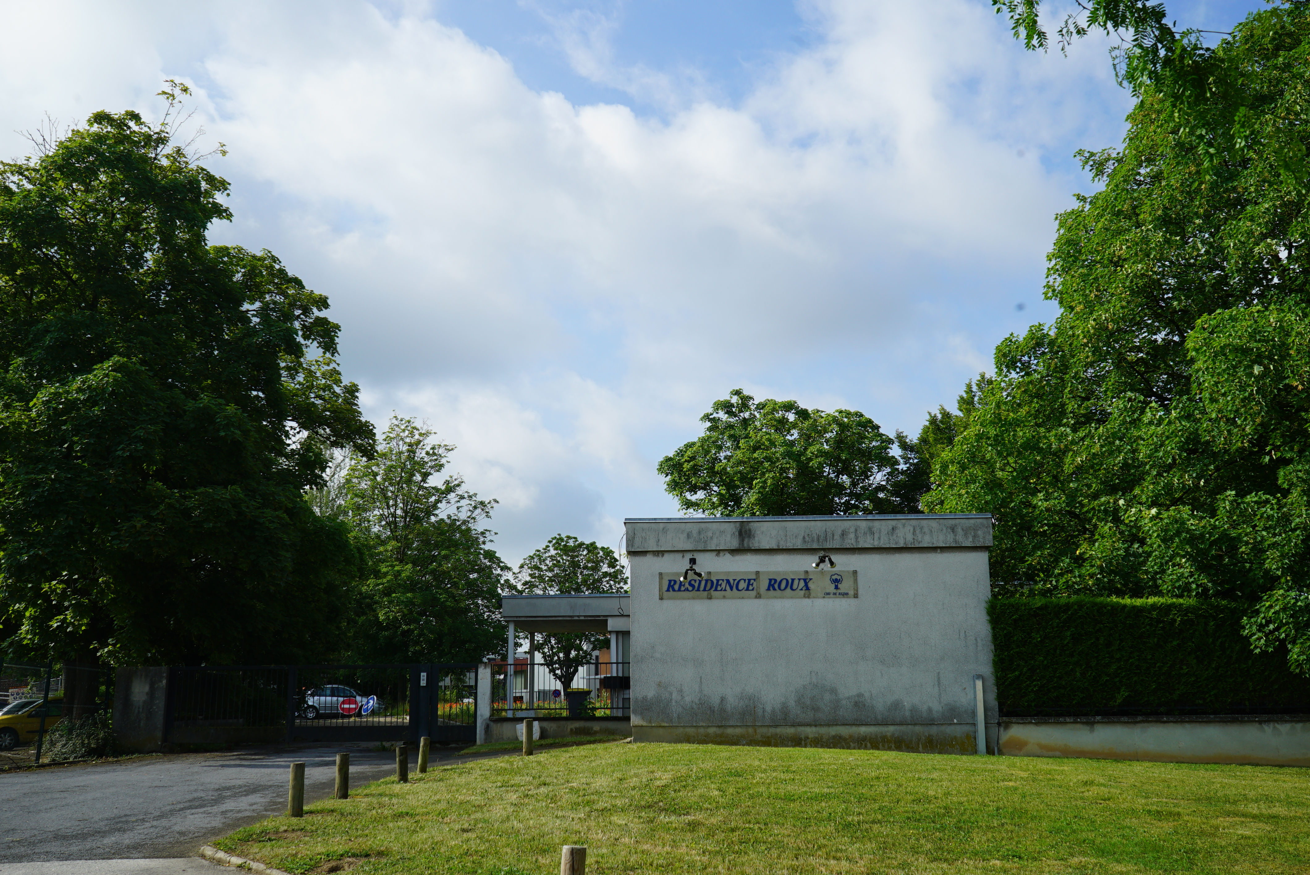 vue d'une partie du Centre Hospitalier Universitaire de Reims.